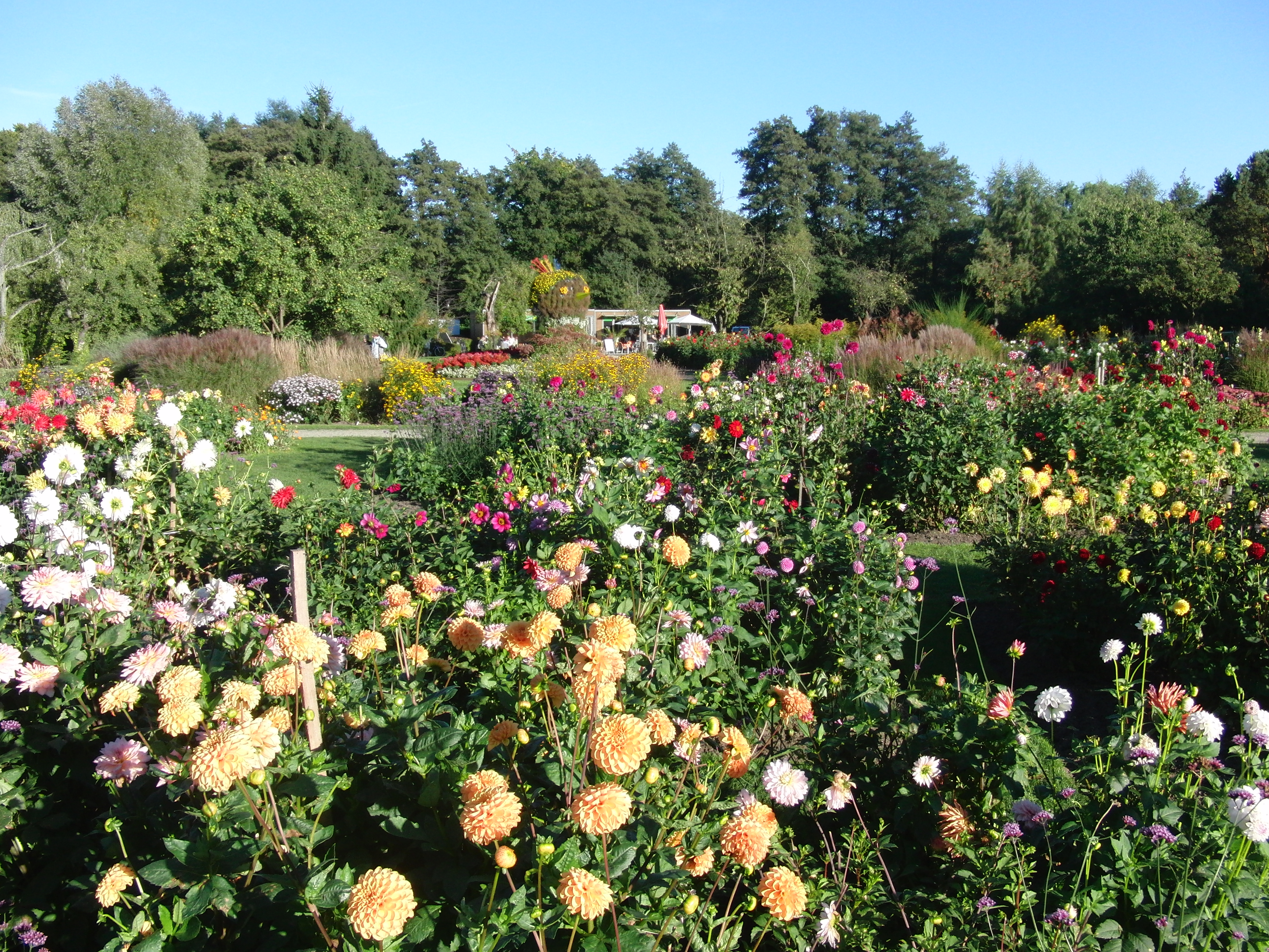 Dahlien im Park "Gärtner-Fantasien" in den Luhegärten in Winsen (Luhe)